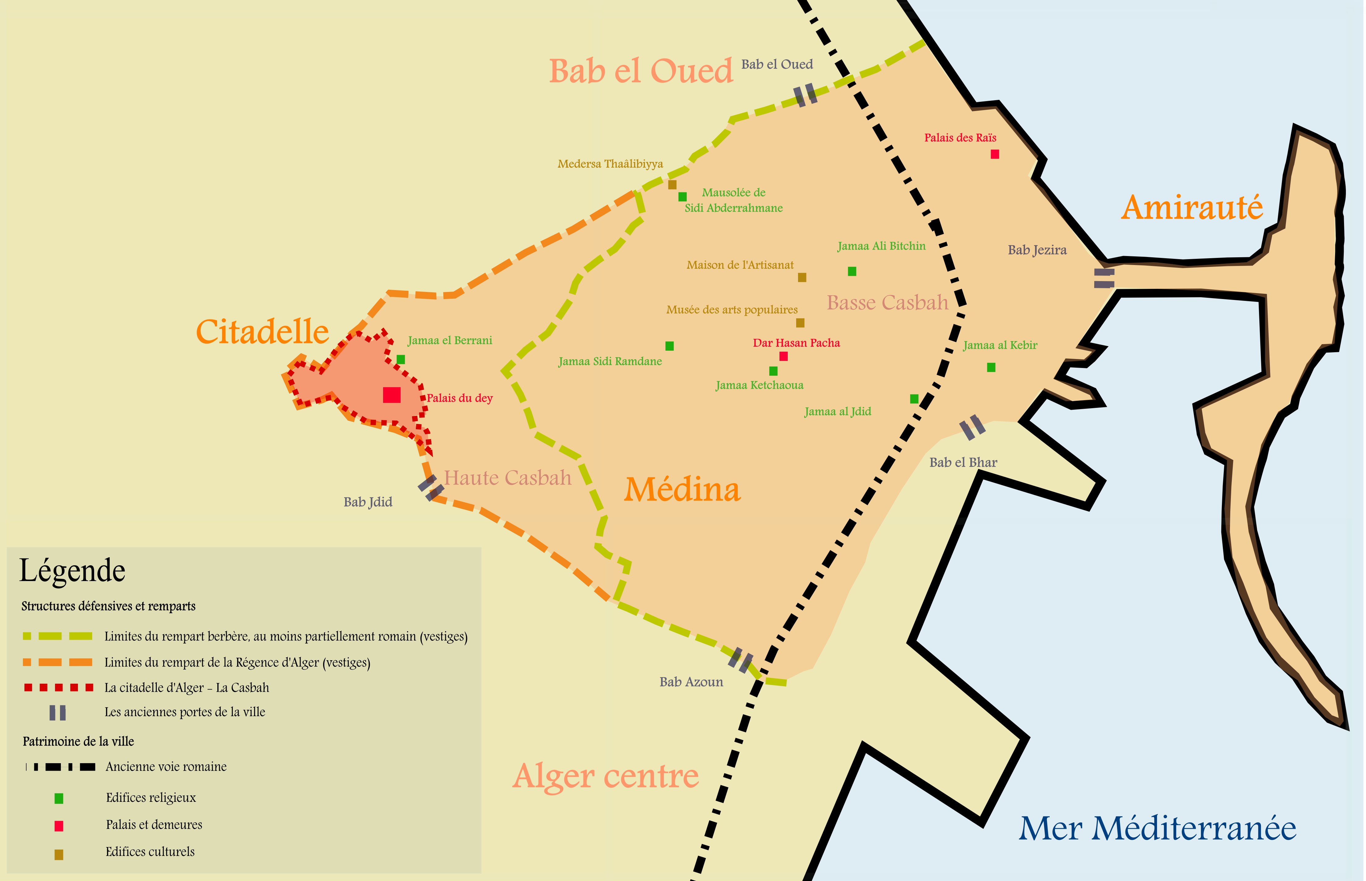 Plan de la Casbah et de son patrimoine. Source : Marcel Le Glay, A la rechercher d'Icosium, [1] et carte du quartier [2] - Echelle 1/9000ème.